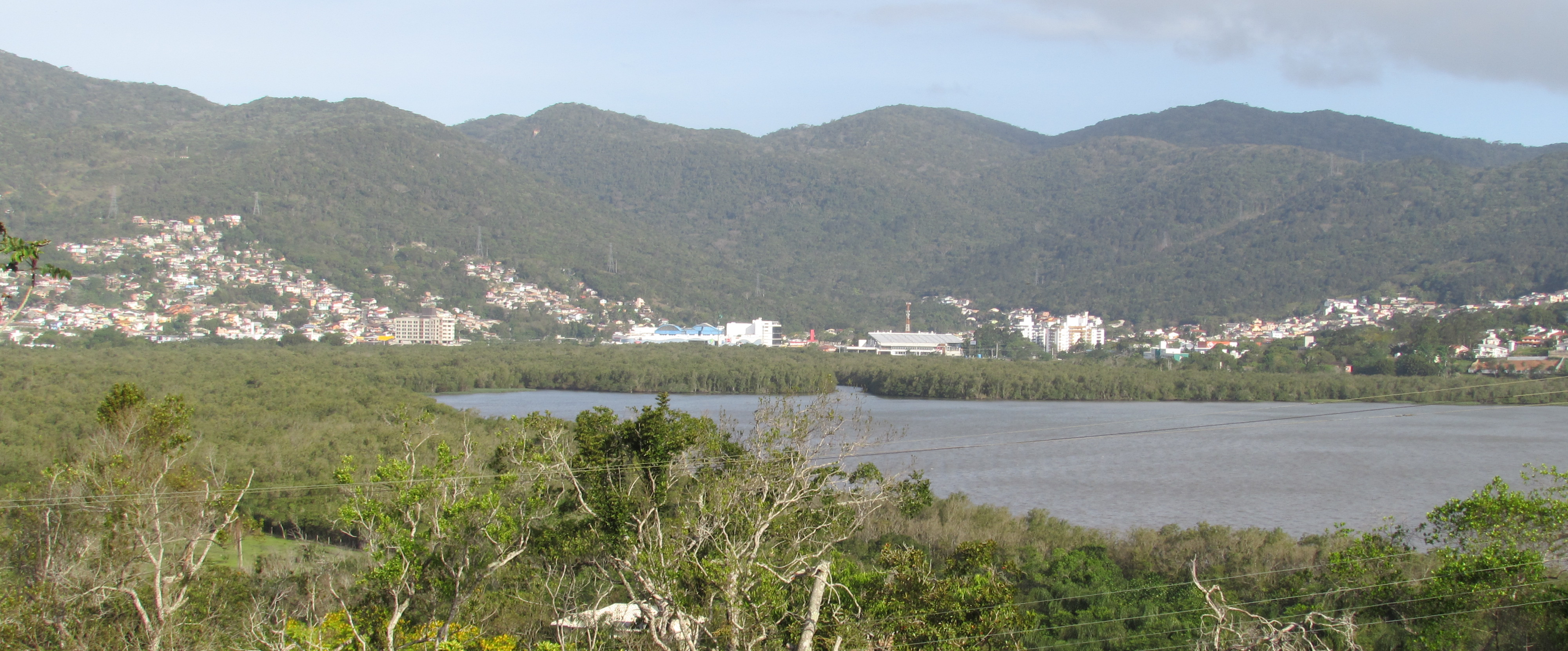 Panorâmica do manguezal ao lado do mar e, ao fundo, dos morros do bairro Saco Grande. Manguezal pertence à área protegida pela Estação Ecológica de Carijós, no Bairro Saco Grande em Florianópolis, sul do Brasil. Foto de 2018.